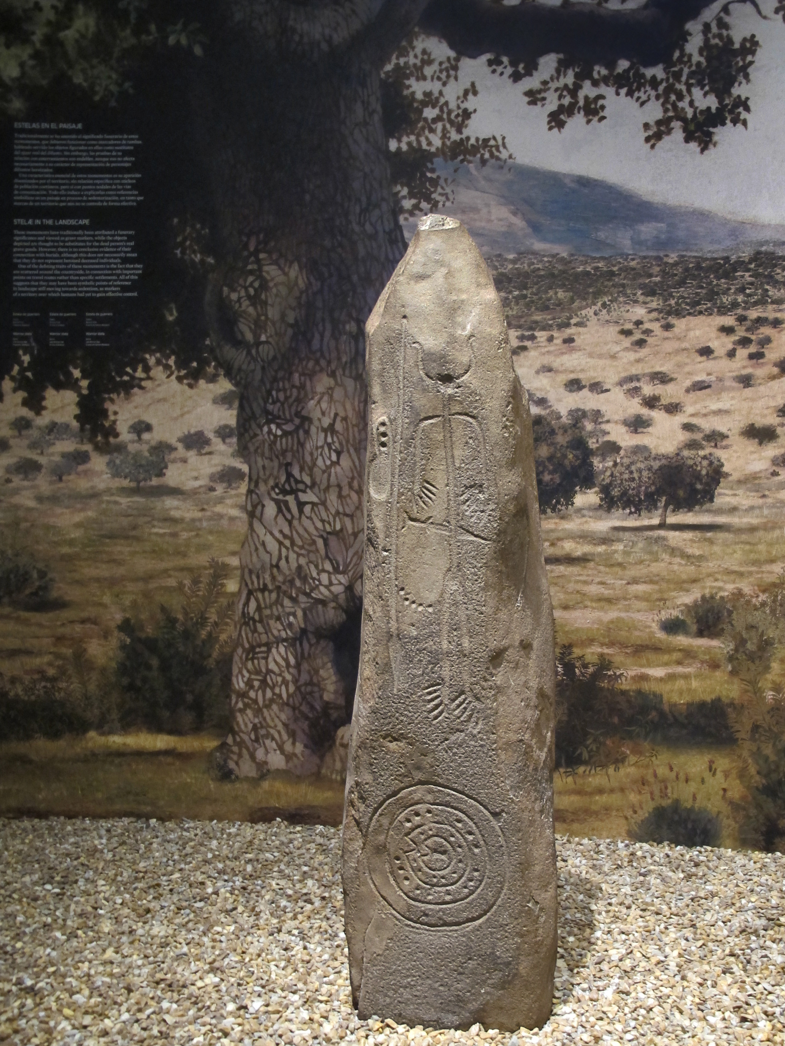 Uno de los ejemplares más bellos entre todas sus análogas. Estela de guerrero en forma de betilo, de piedra arcillosa gris oscura de forma alargada en forma de cono piramidal. La decoración que aparece grabada en ella corresponde a la figura de un guerrero con casco de cuernos, sus armas, lanza, puñal o daga, escudo y otros elementos como un espejo, y algún elemento que desconocemos representado mediante pequeñas cazoletas. La figura del guerrero y en general todos los elementos decorativos, están representados mediante simples líneas, características formales de este arte. Hasta los años 30 del siglo XX la estela se encontraba reutilizada formando parte del muro de una huerta Museo Arqueologico Nacional - Madrid